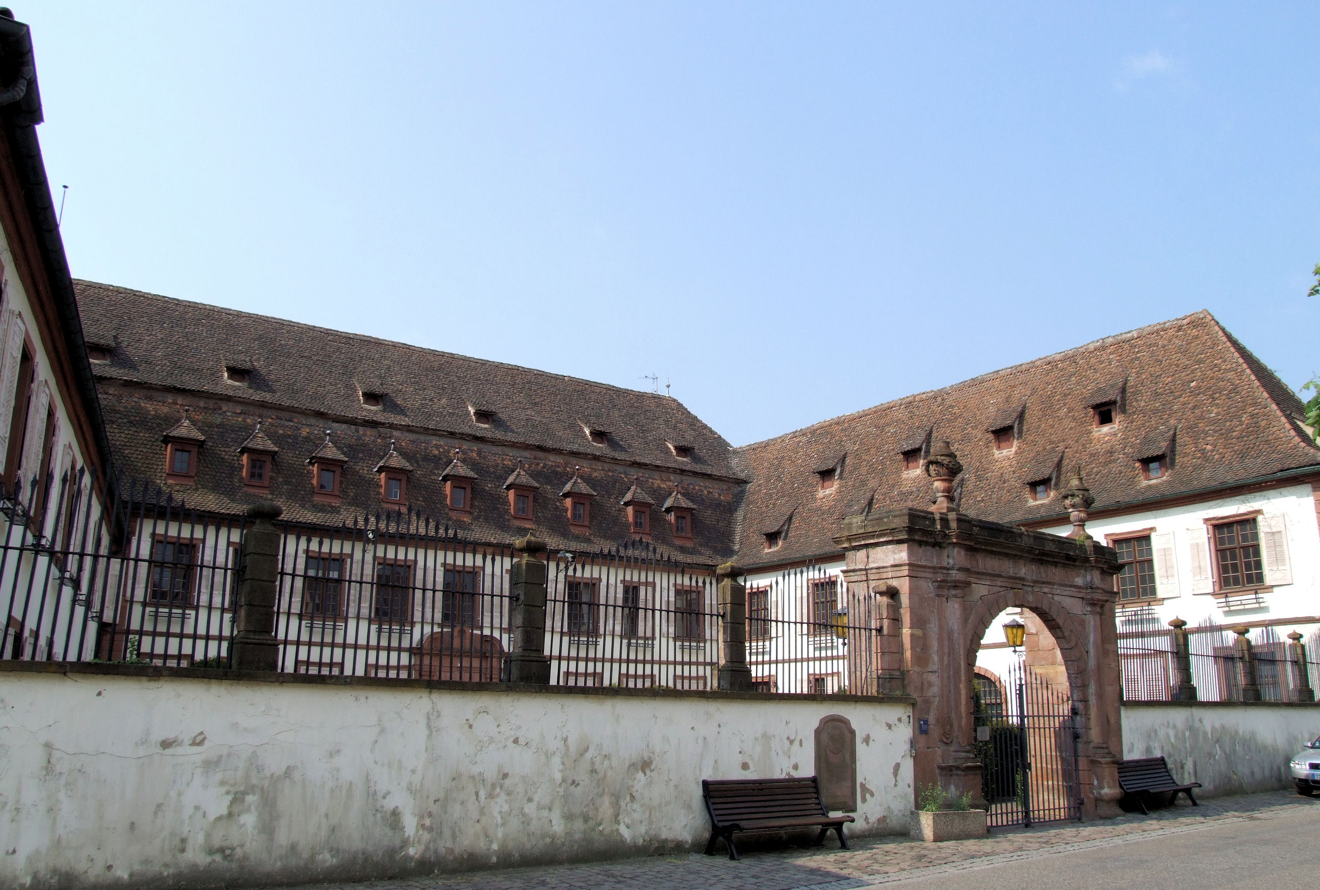 Wissembourg - Hôtel Stanislas